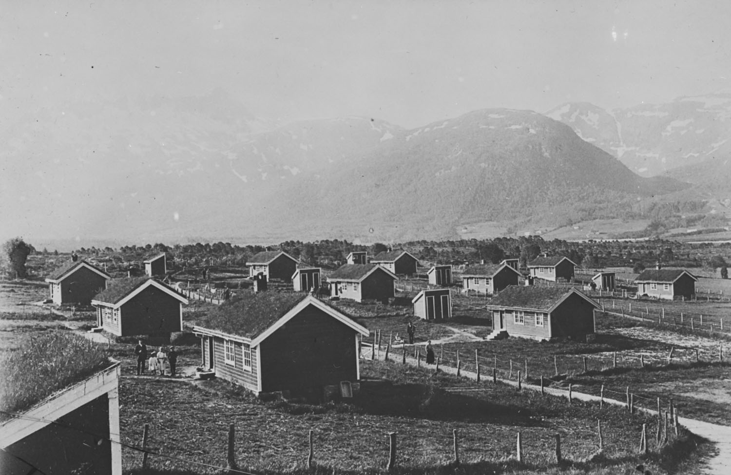 Fotograf: ukjent Sted: Eide kommune, Nordmøre, Norge/ Norway Arkivreferanse: Riksarkivet, PA-0793_923G NBR 9403:01391 Beskrivelse: Svanviken Arbeidskoloni på Nordmøre tilbød bo - og arbeidstrening for de voksne og skole for barna. De ti familieboligene var på 30 kvadratmeter med ett mål jord til. url